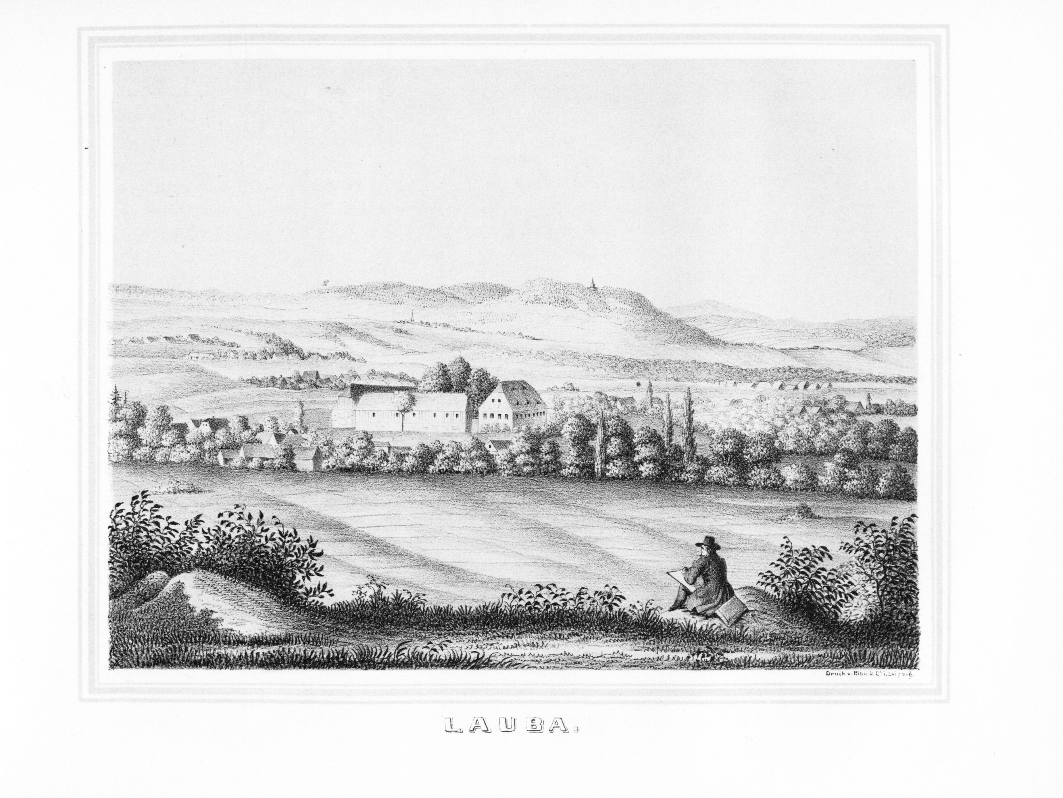 Lauba aus: Album der Rittergüter und Schlösser im Königreiche Sachsen Markgrafenthum Oberlausitz Section: III